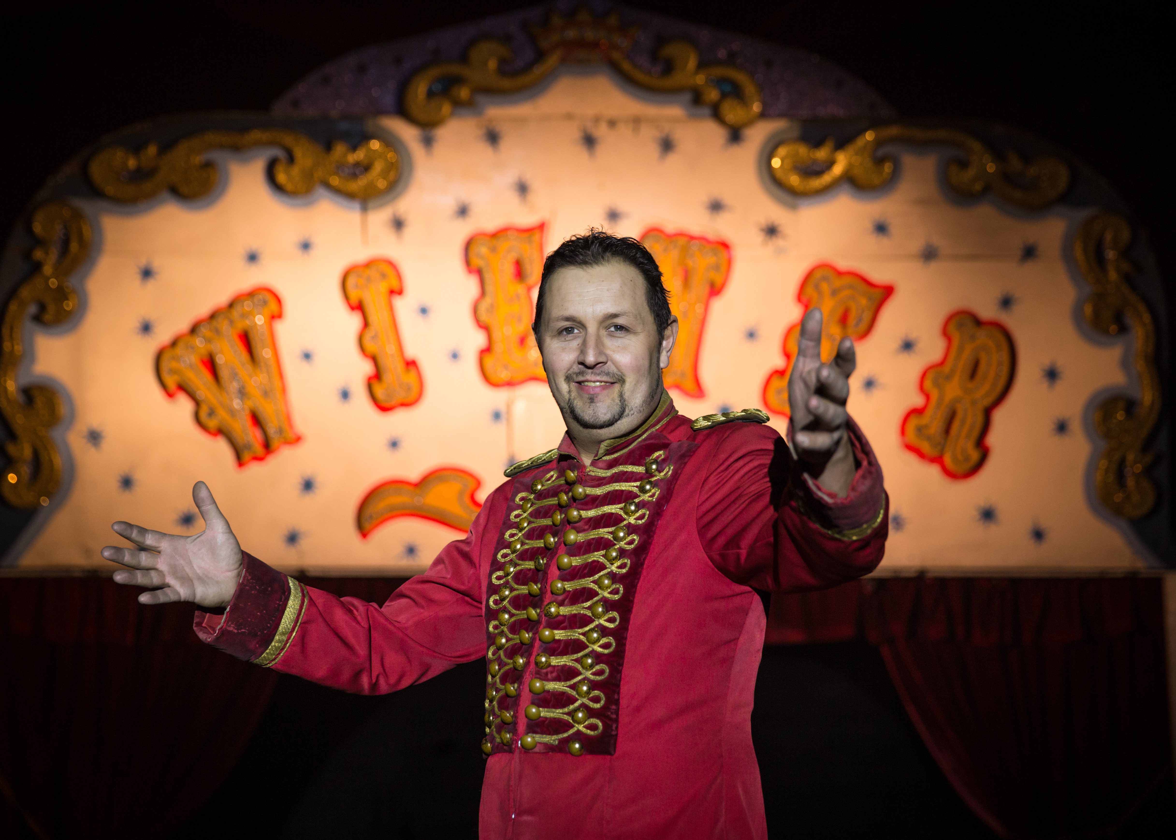 Ricky Cannone, circusdirecteur van Wiener Circus, in De Panne februari 2018.